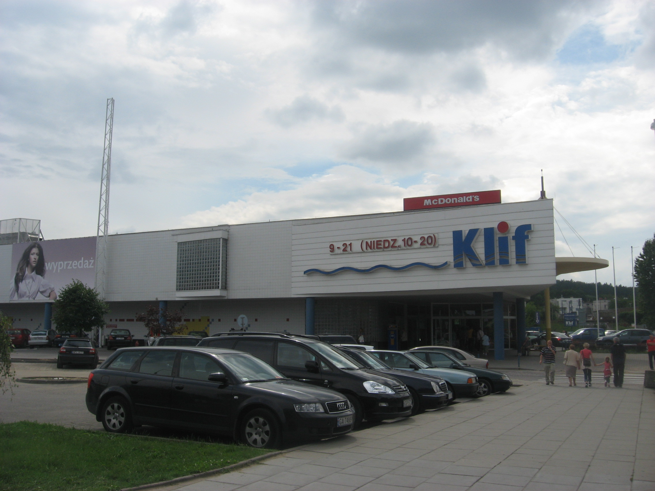 Trójmiejskie Centrum Handlowe Klif w Gdyni